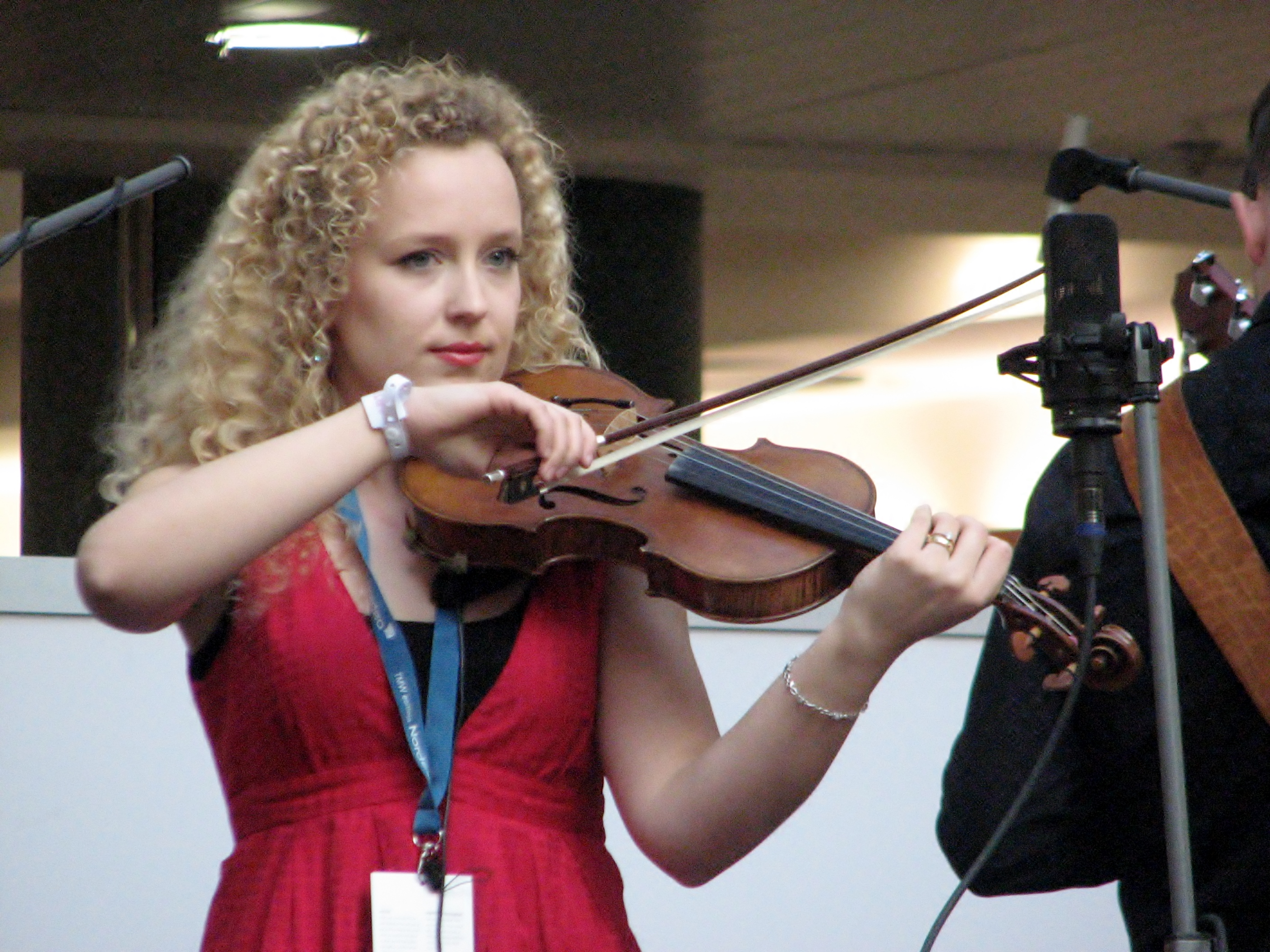 Eeva Talsi esinemas ansambli Curly Strings koosseisus Tallinn Music Weekil